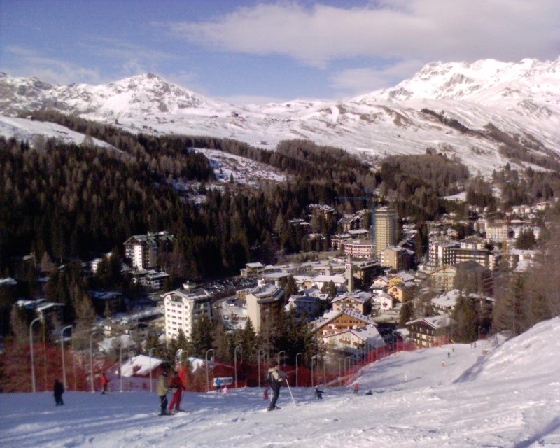 Madesimo vista dalle piste da sci. Foto scattata da Fiore.